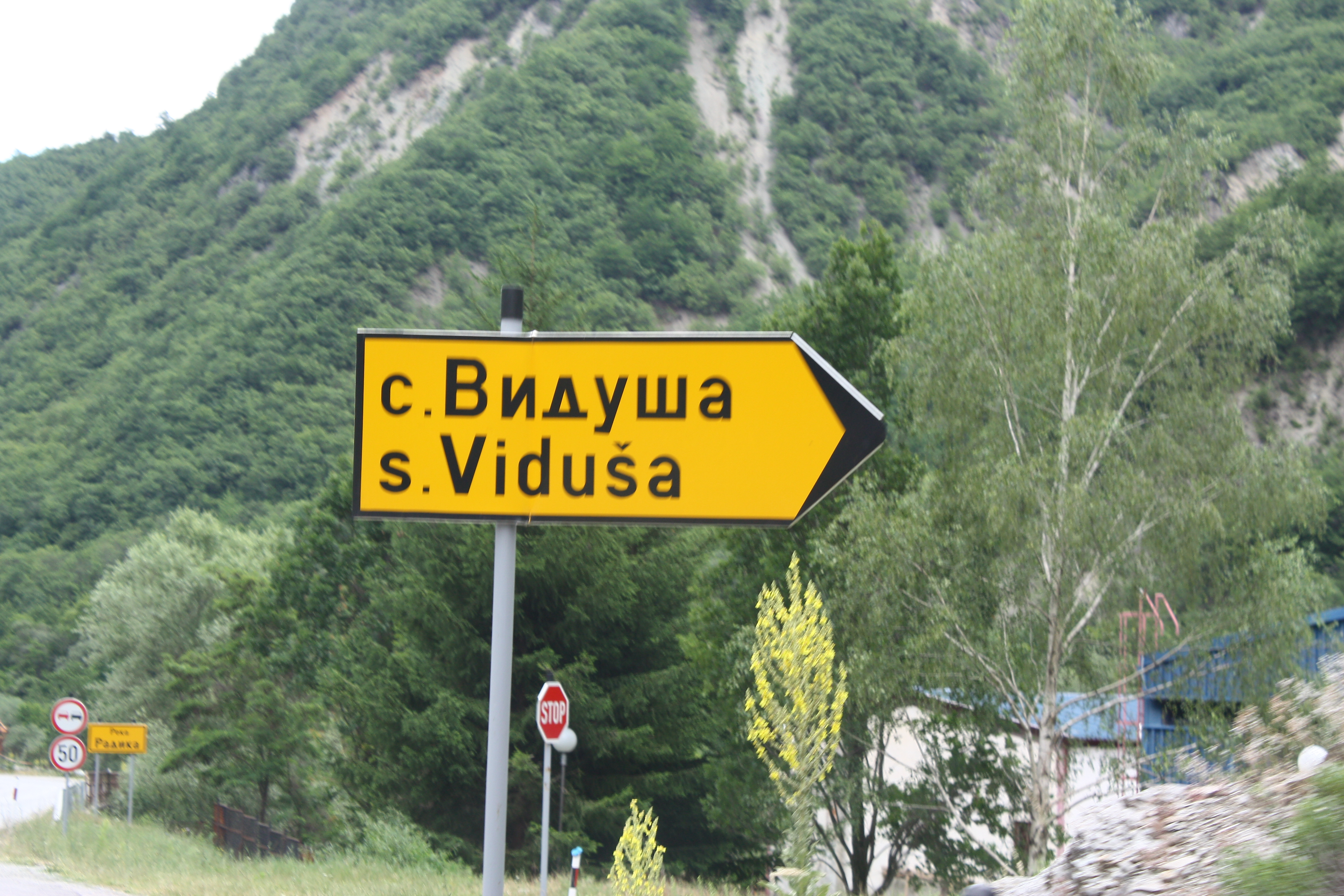 Знак за селото Видуше, Општина Маврово-Ростуше